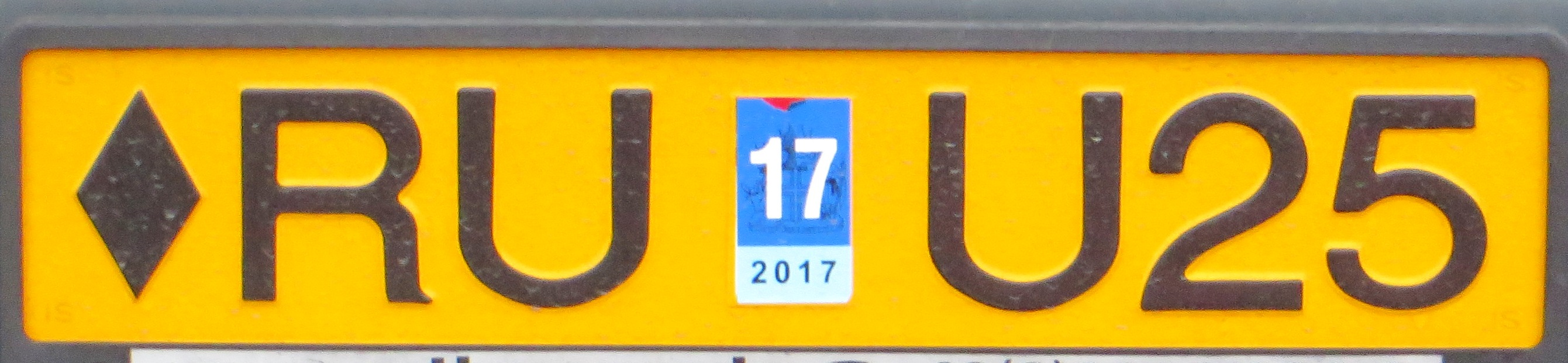 IJSLAND kentekenplaat